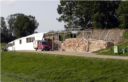 Restaurierung der Waldemarsmauer 2007; Aufbau eines Schutzzeltes